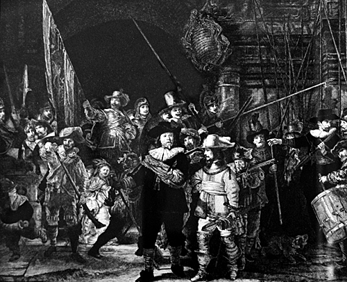 Nachtwacht in pen